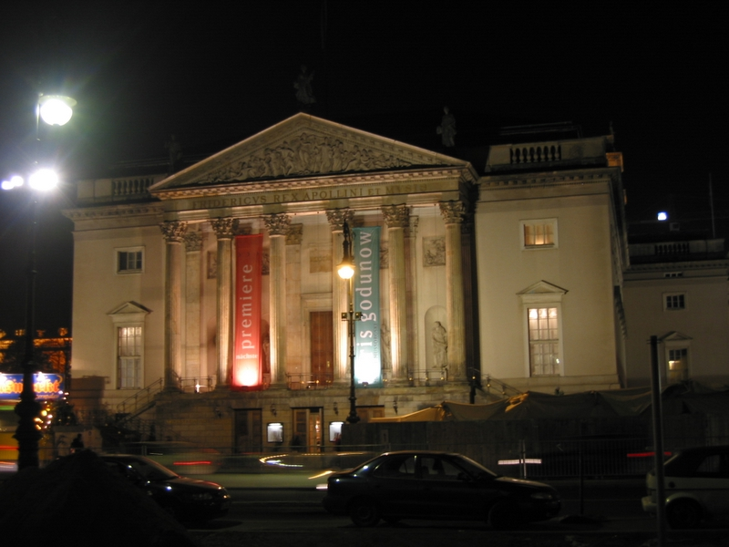 האופרה הממלכתית בשדרות אונטר דן לינדן, ברלין. צולם על ידי Harel - שיחה 22:21, 26 מרץ 2006 (UTC).